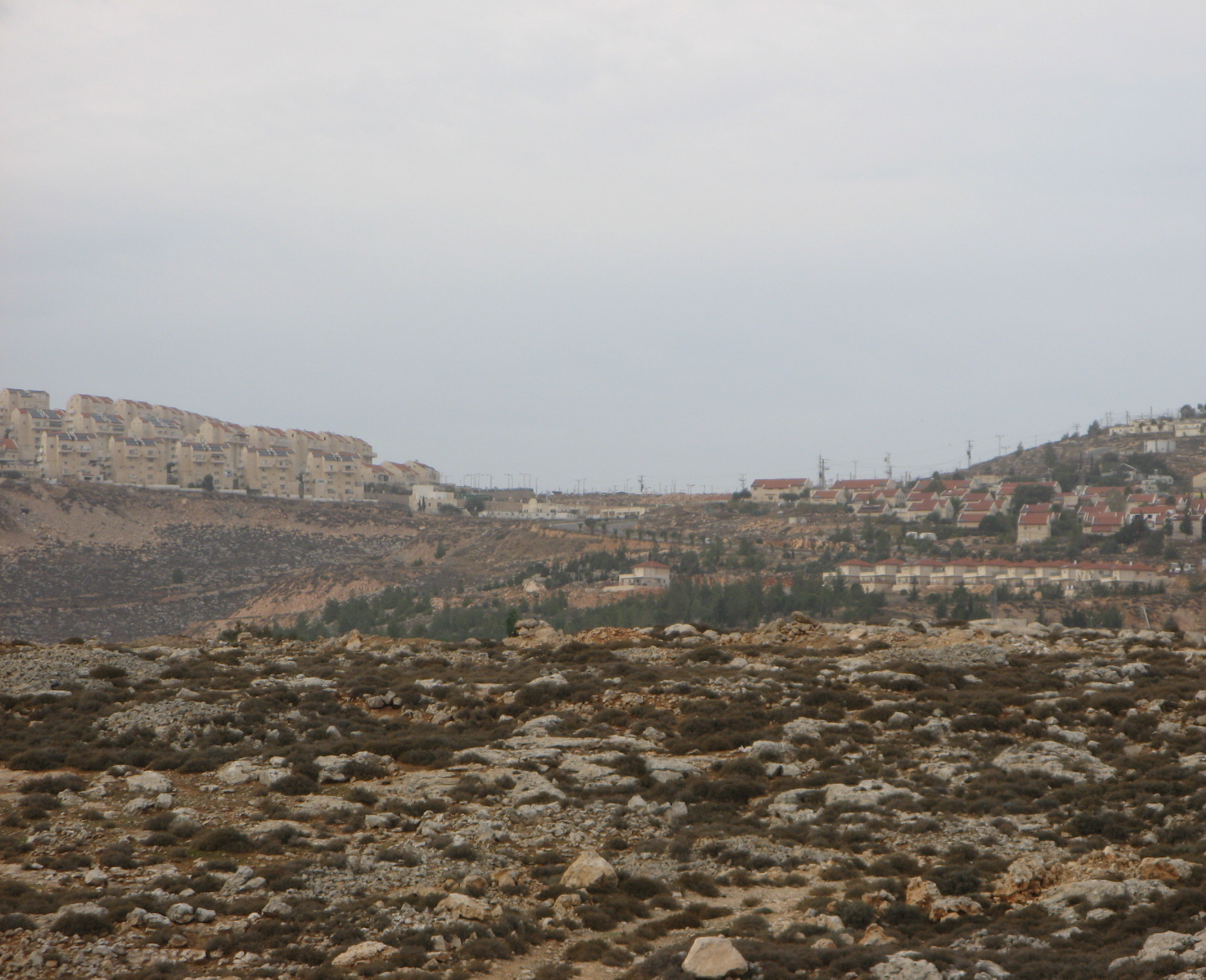 Kohav Yaakov from Road 60